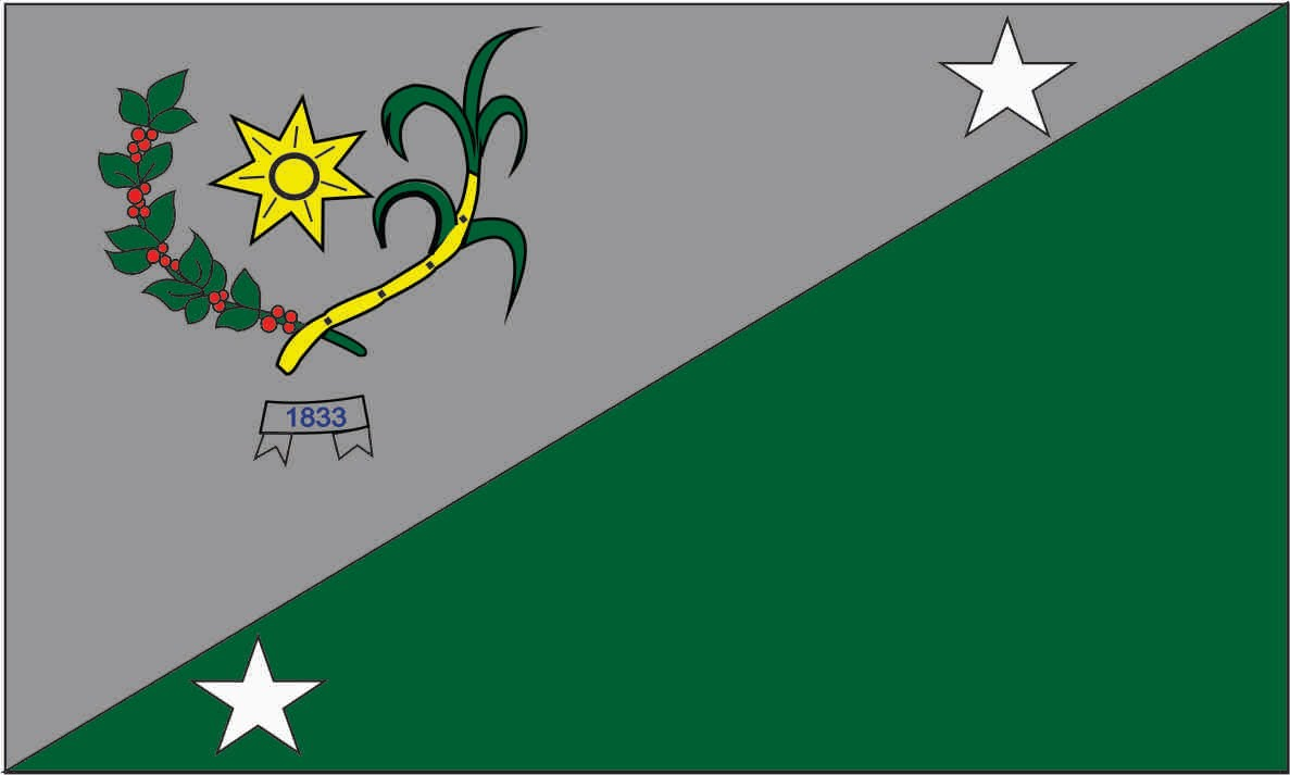 Bandeira de Bonito - PE O verde, representa a mata e o cinza, o agreste. O ramo de café e de cana, foram os principais produtos agrícolas do município. A estrela do lado verde, representa o distrito de Bentevi e a que está na parte cinza, Alto Bonito. O sol que está entre os principais produtos agrícolas, representa o primeiro distrito que é a cidade de Bonito. a divisa com a inscrição 1833 é a data da emancipação política do Bonito.